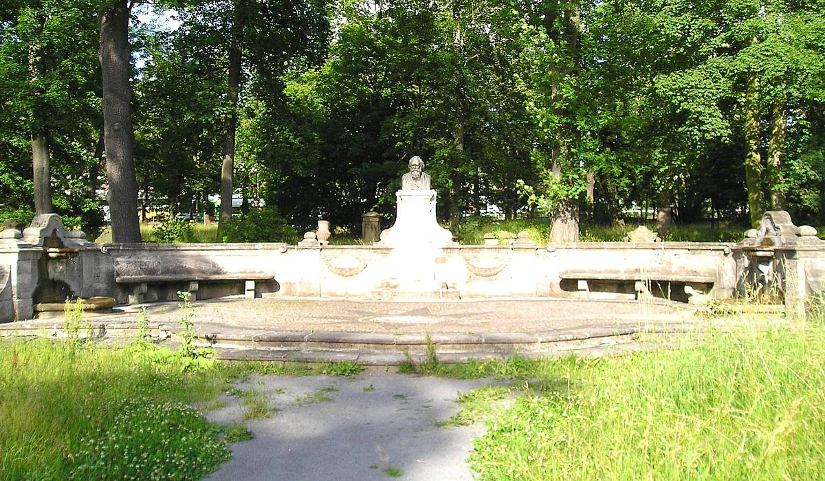 Denkmalanlage „Johannes Brahms“ im Englischen Garten von Meiningen